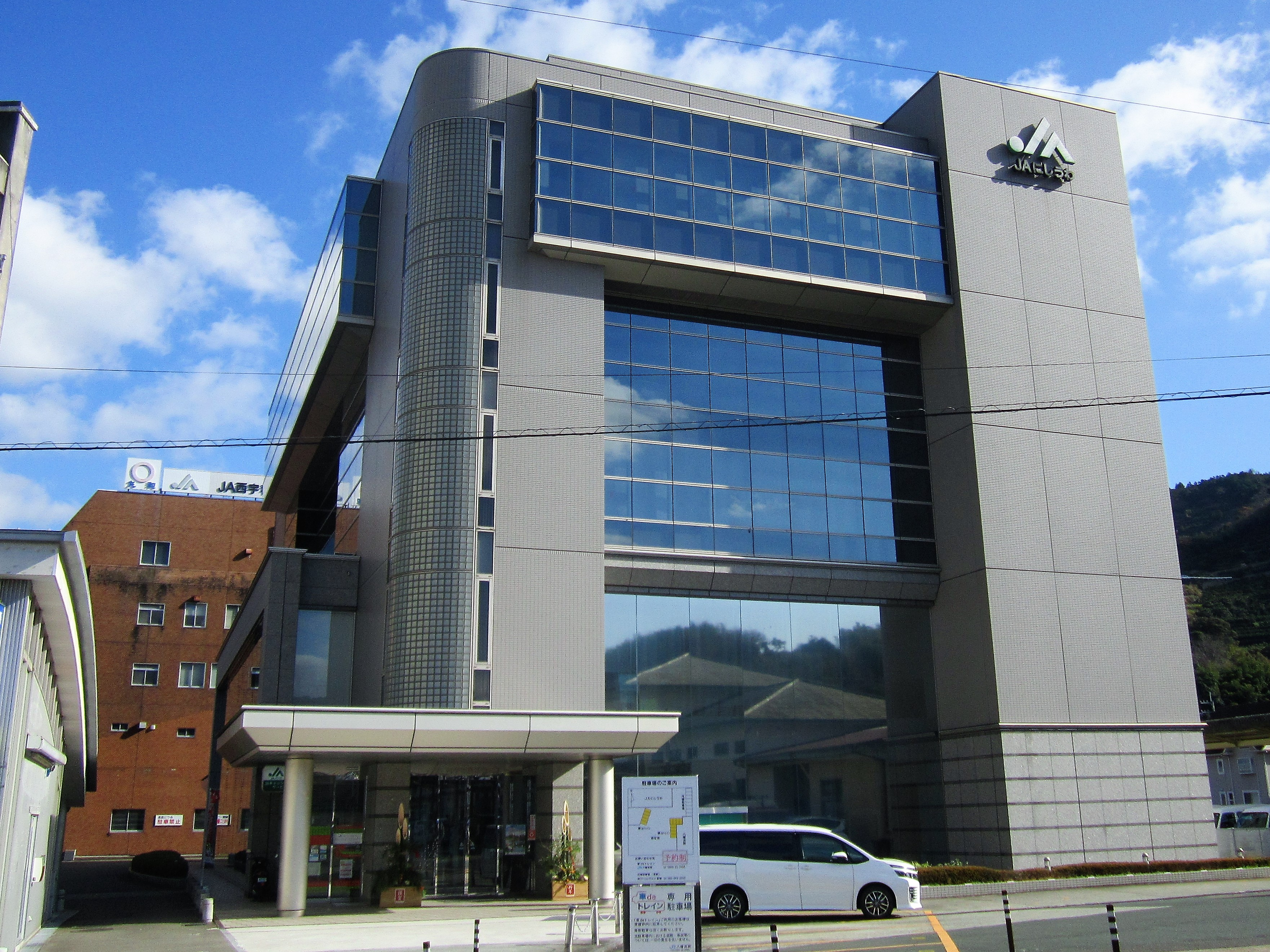 西宇和農業協同組合 本店・八幡浜支店（八幡浜市江戸岡）